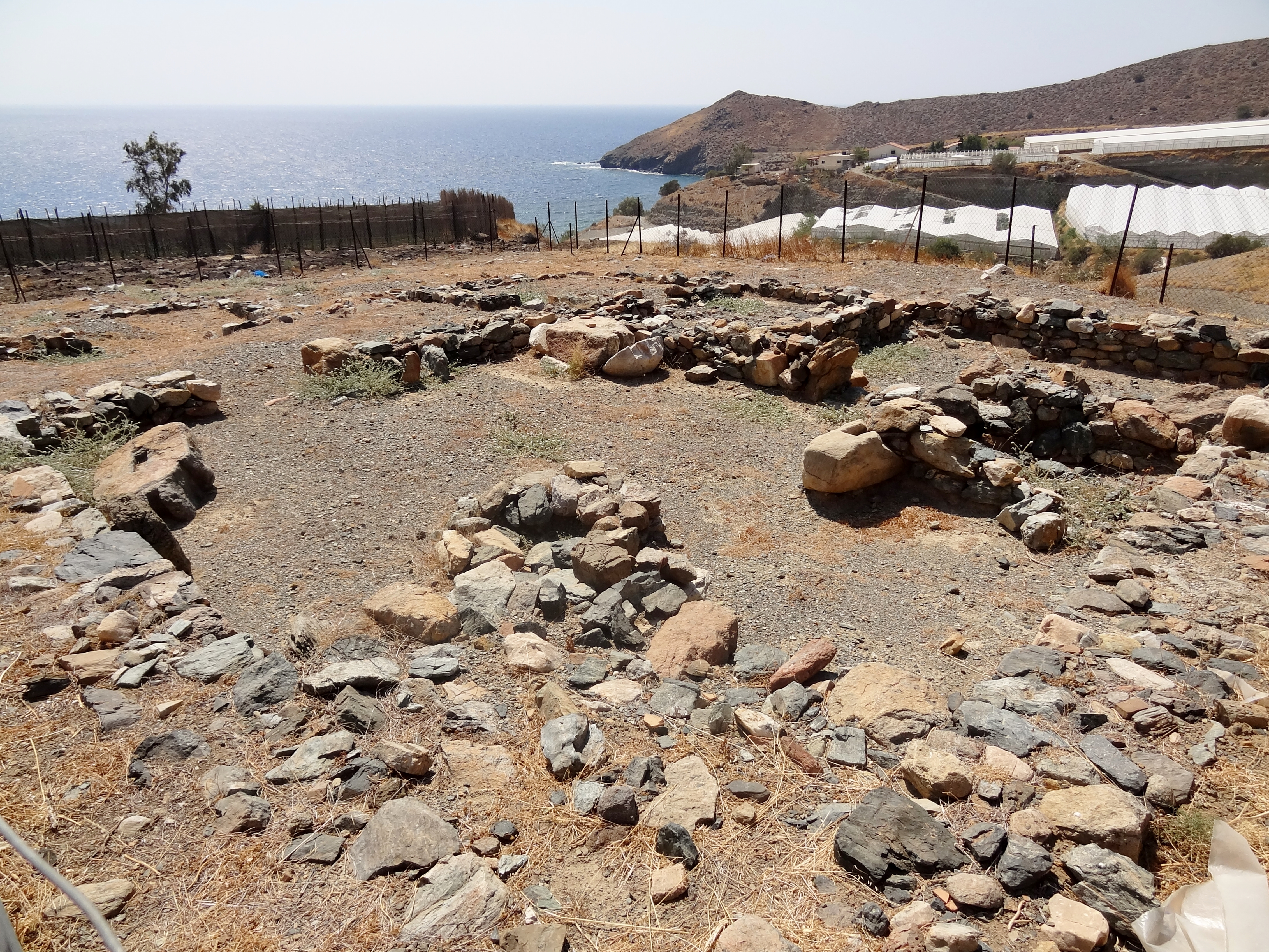 Ausgrabungsstätte des griechisch-römischen Landhauses von Gerokambos (Γερόκαμπος), Gemeinde Gortyna, Regionalbezirk Iraklio, Kreta, Griechenland